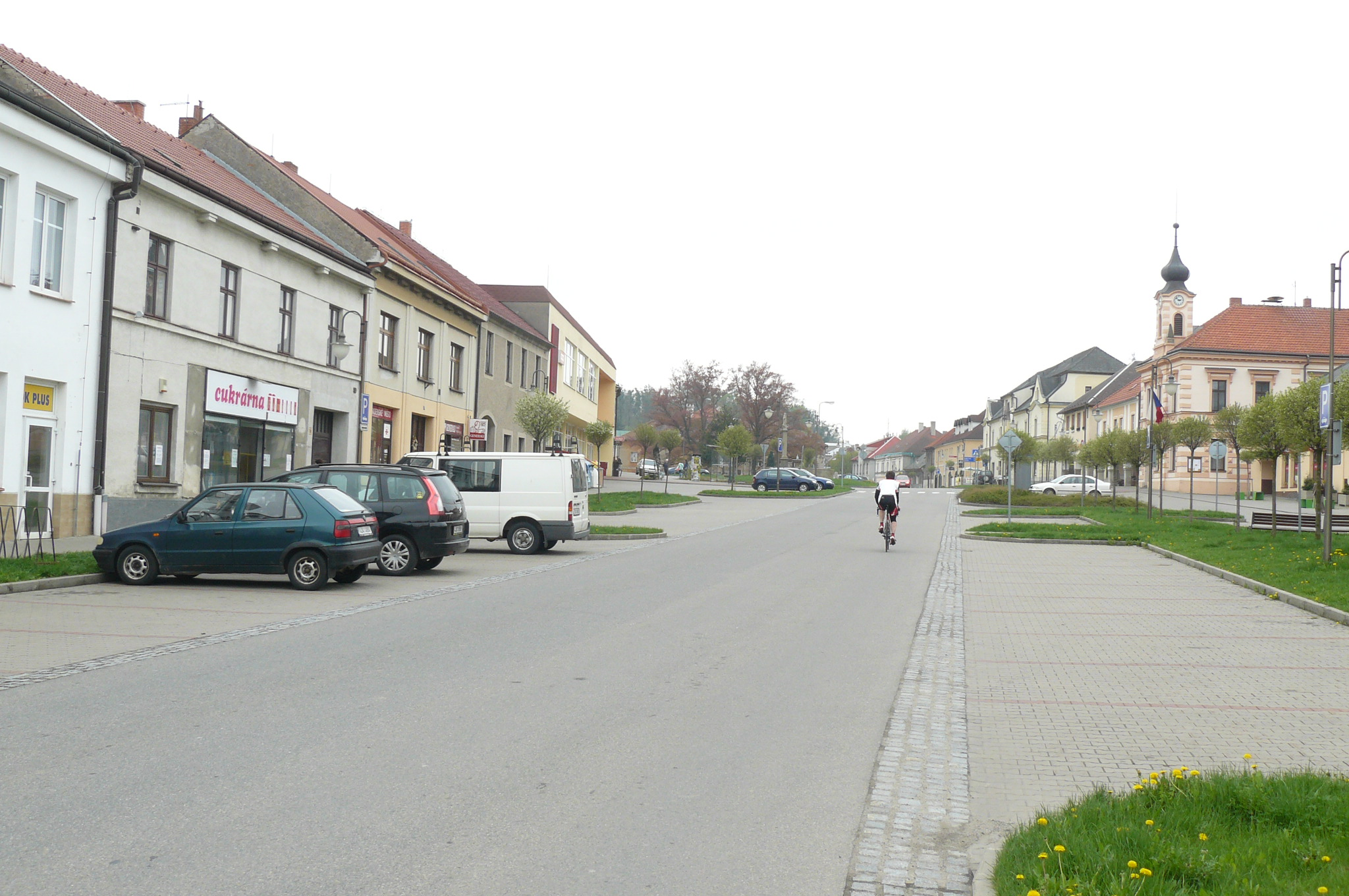 Golčův Jeníkov, rynek miejski.